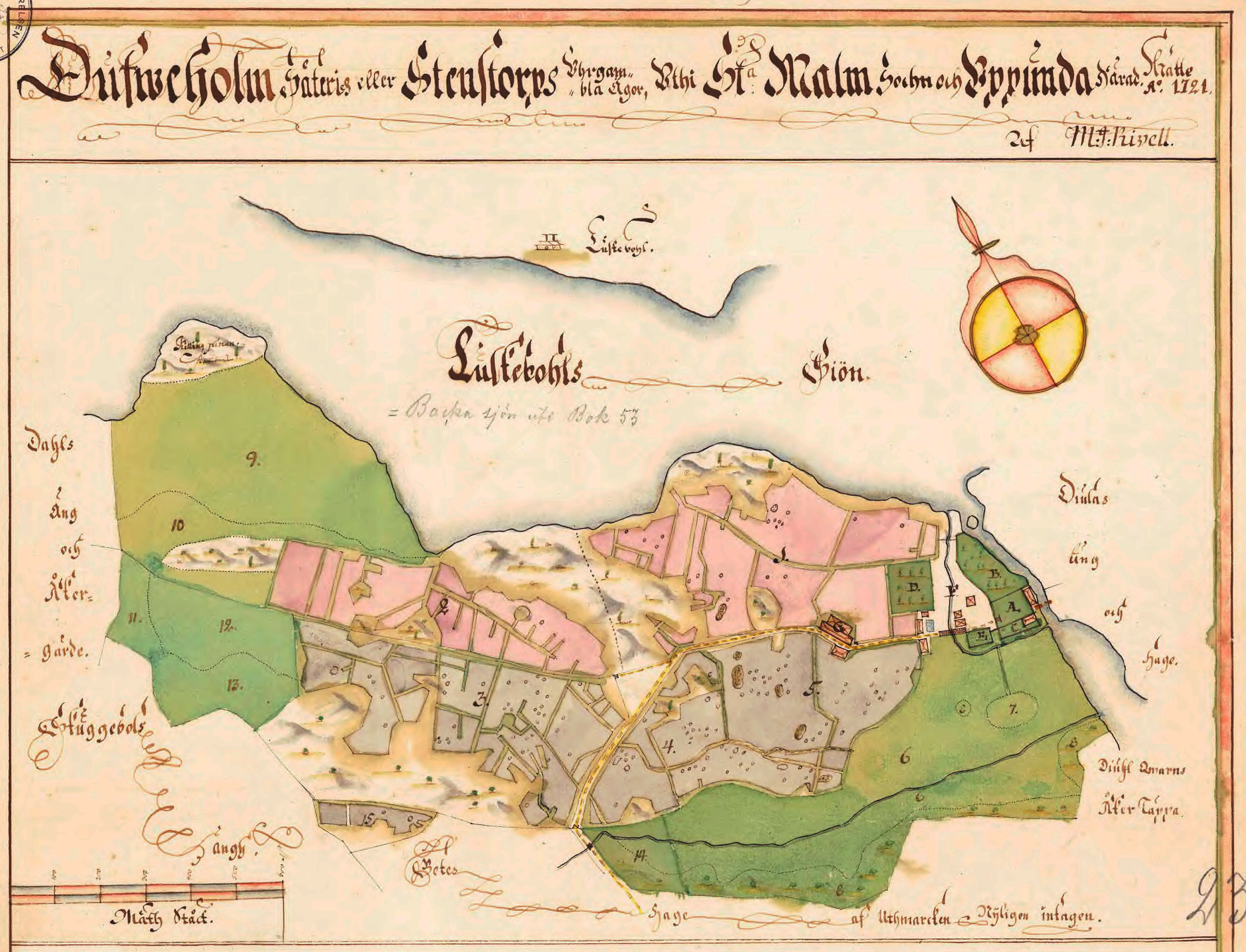 Dufweholm på en karta från 1721